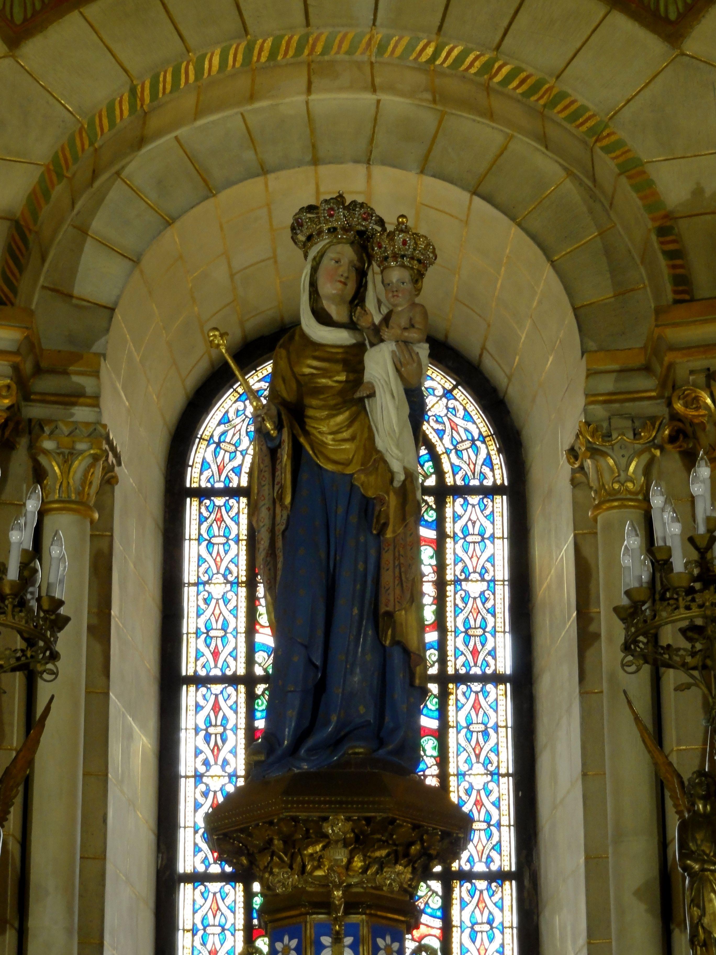 Abside, statue de Notre-Dame de Bonne Garde, la sainte patronne de la basilique et du diocèse.